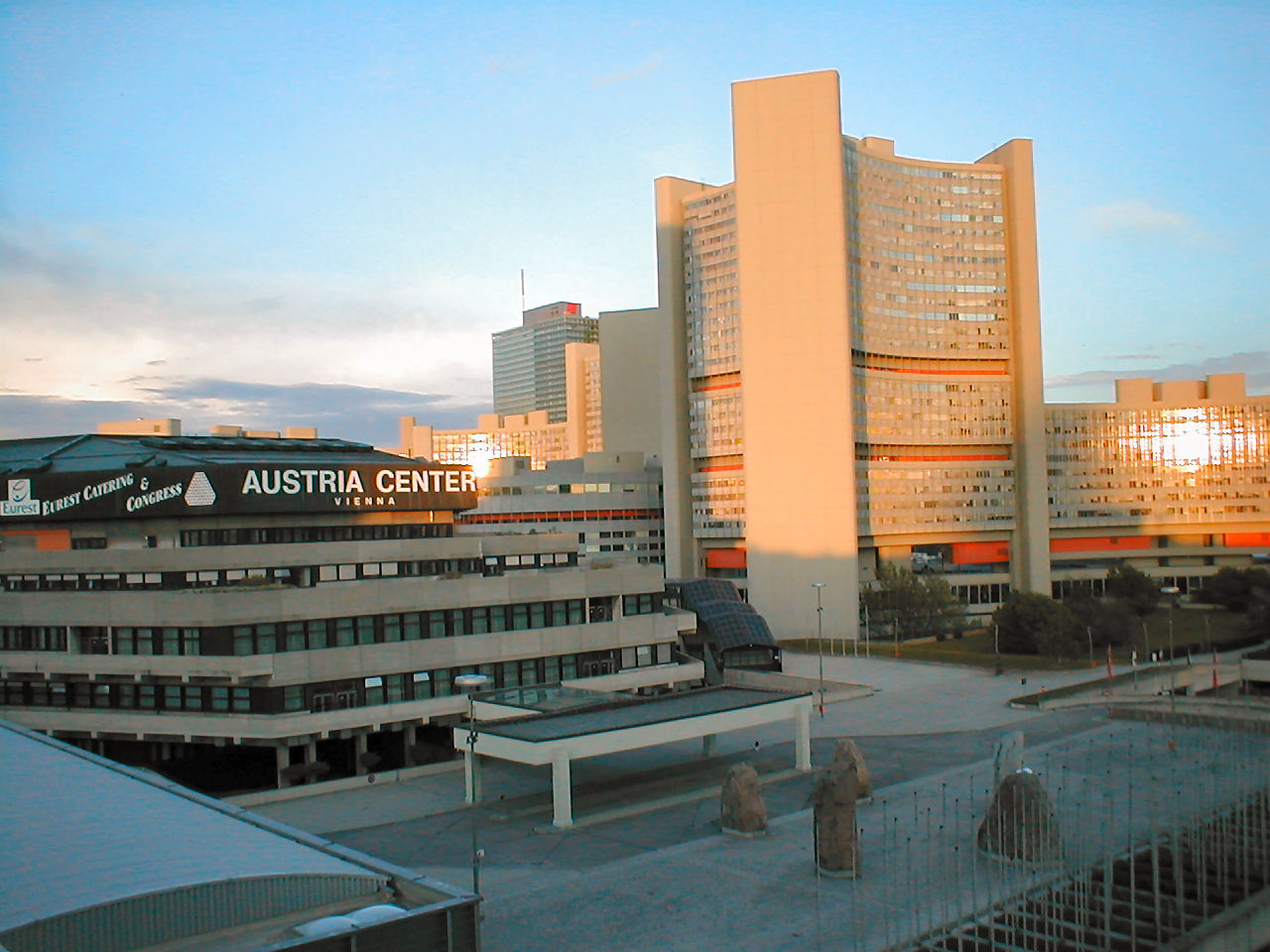 Kategorie:Bild:Gebäude (Original text: Austria Center Vienna)